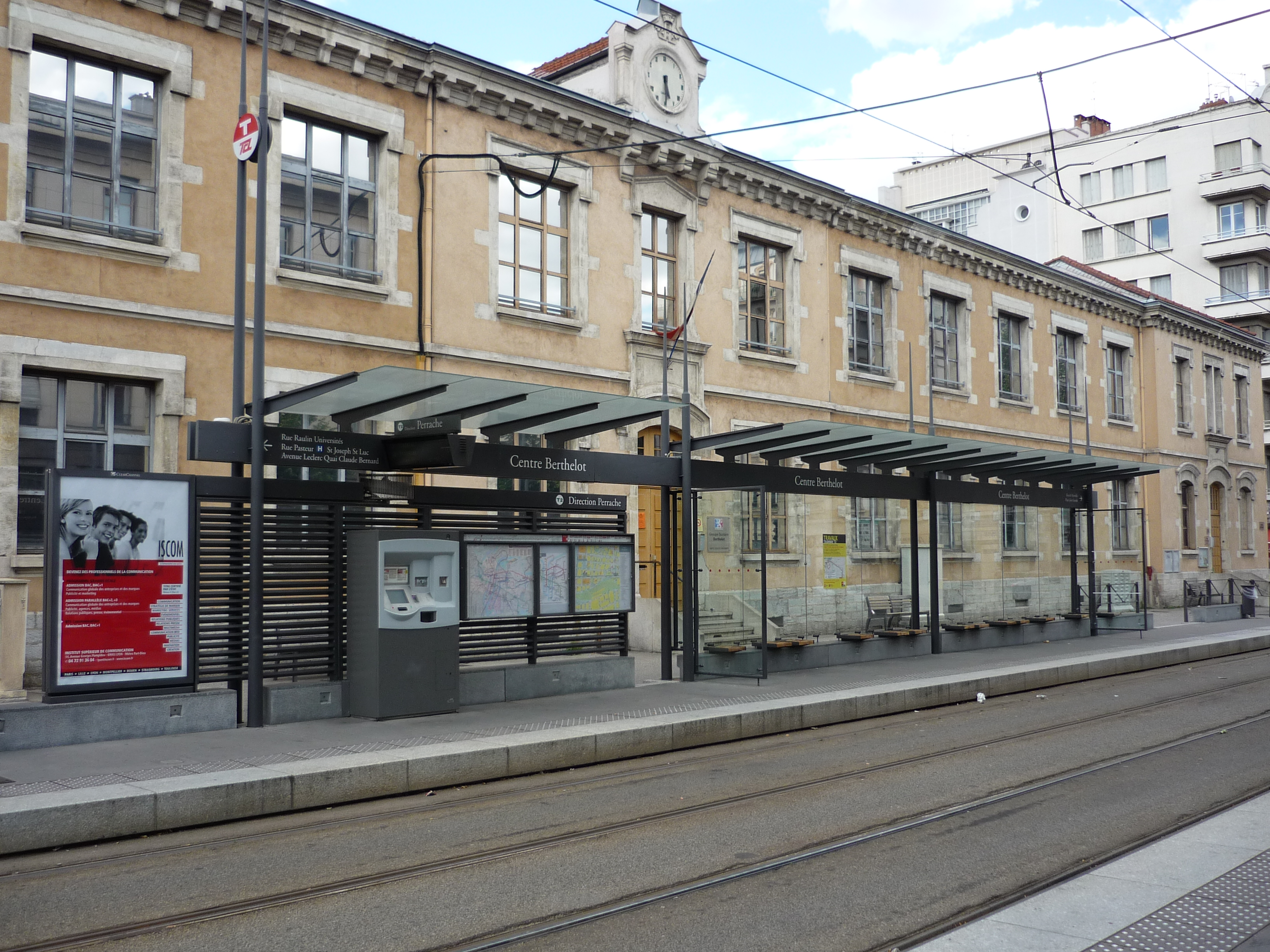 Station Centre Berthelot de la ligne T2 du tramway de Lyon, ici dans la direction Perrache